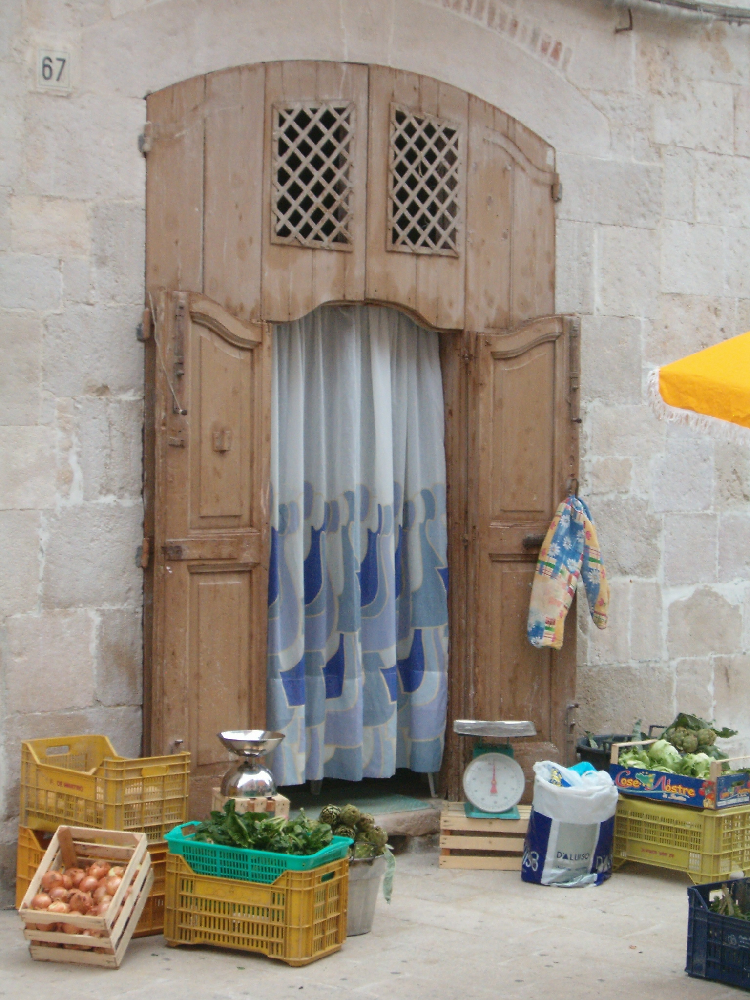 Barletta (Puglia, Italy). Antico negozio in una via popolare del centro storico.